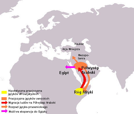 Jedna z hipotez na temat praojczyzny języków semickichŹródło: # Ehret, Christopher, Reconstructing Proto-Afro-Asiatic (Proto-Afrasian): vowels, tone, consonants, and vocabulary, University of California Press, Berkeley 1995 (???)